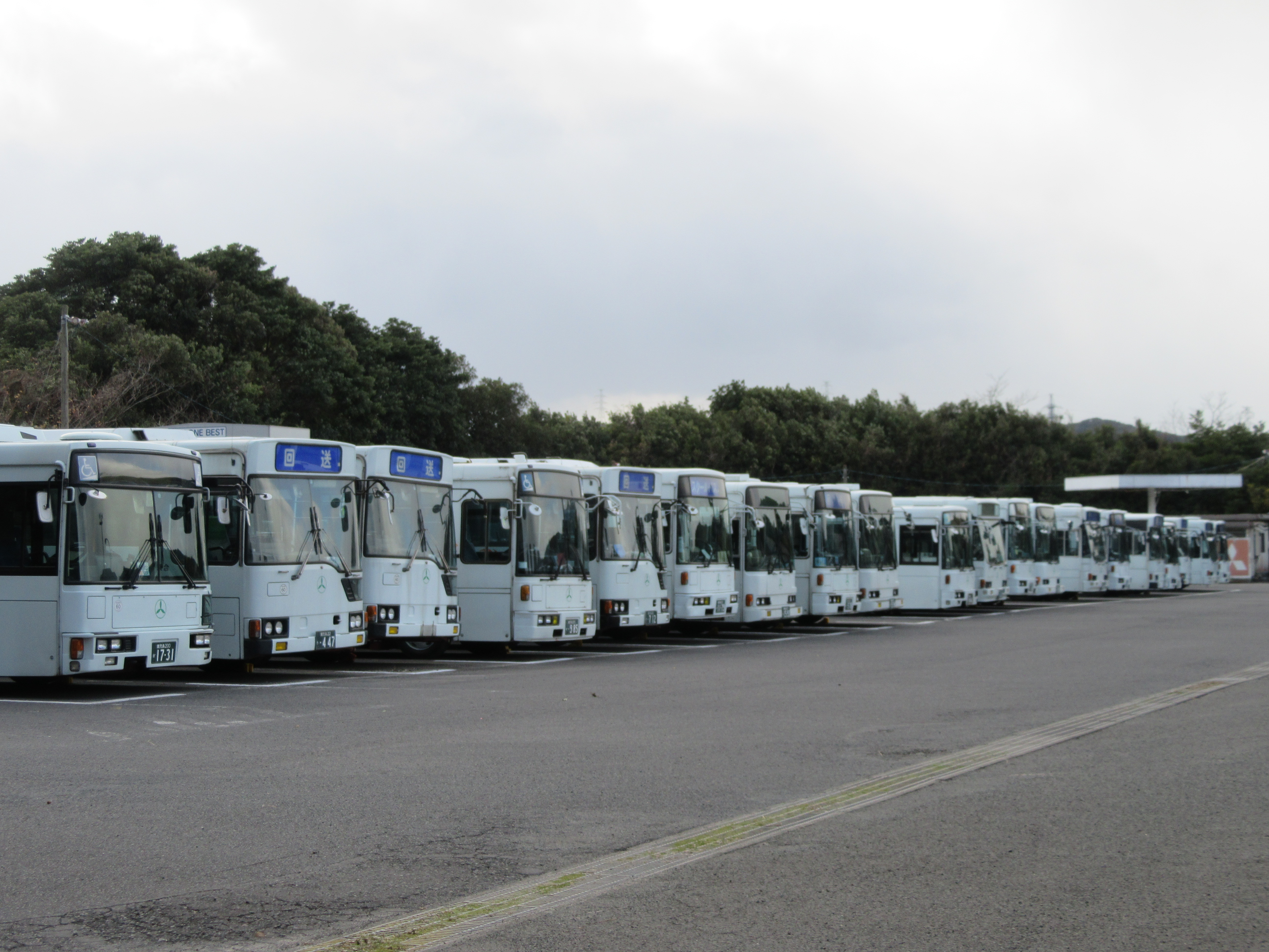 隣接している公道から撮影